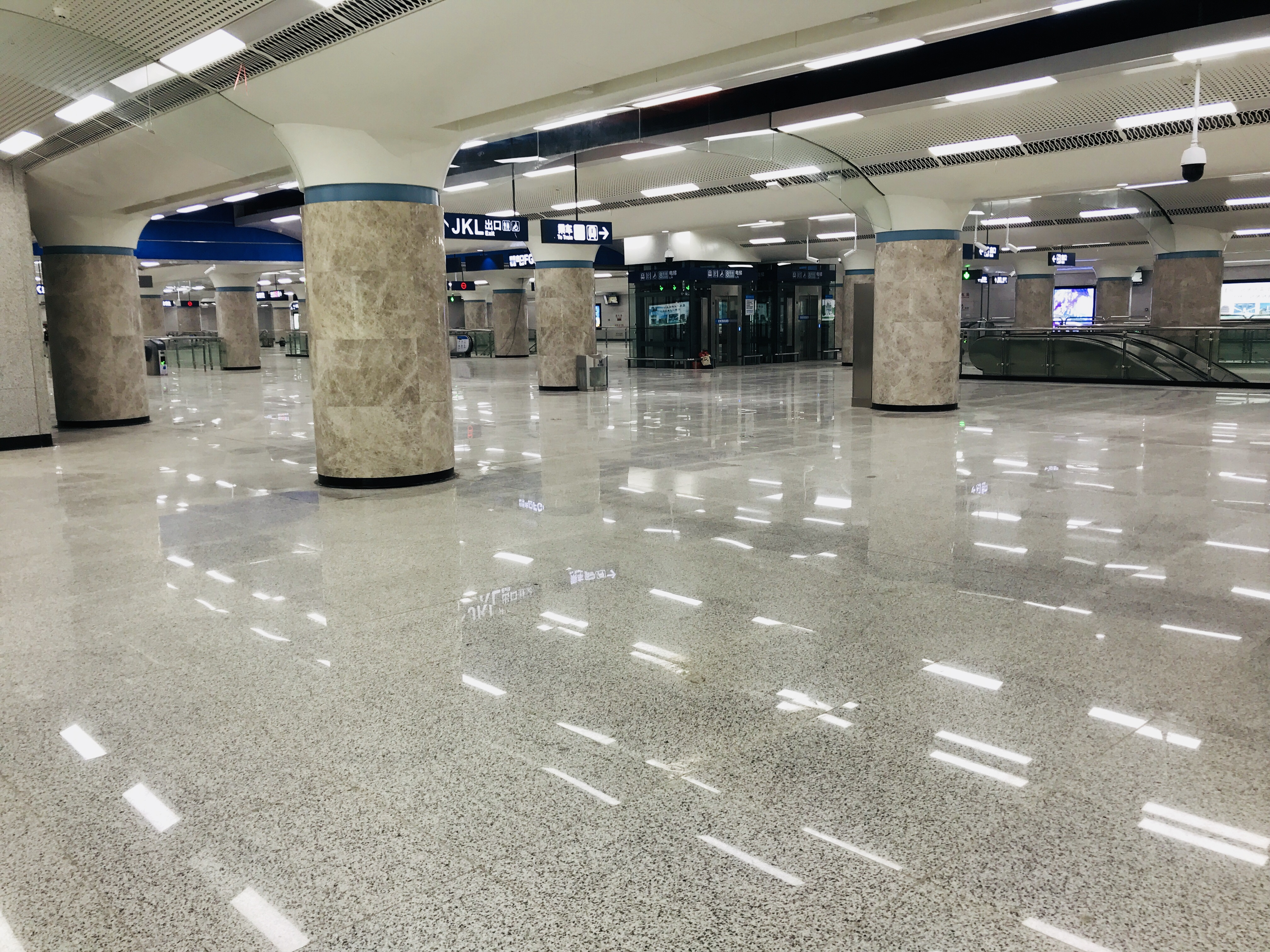 武汉轨道交通8号线宏图大道站站厅